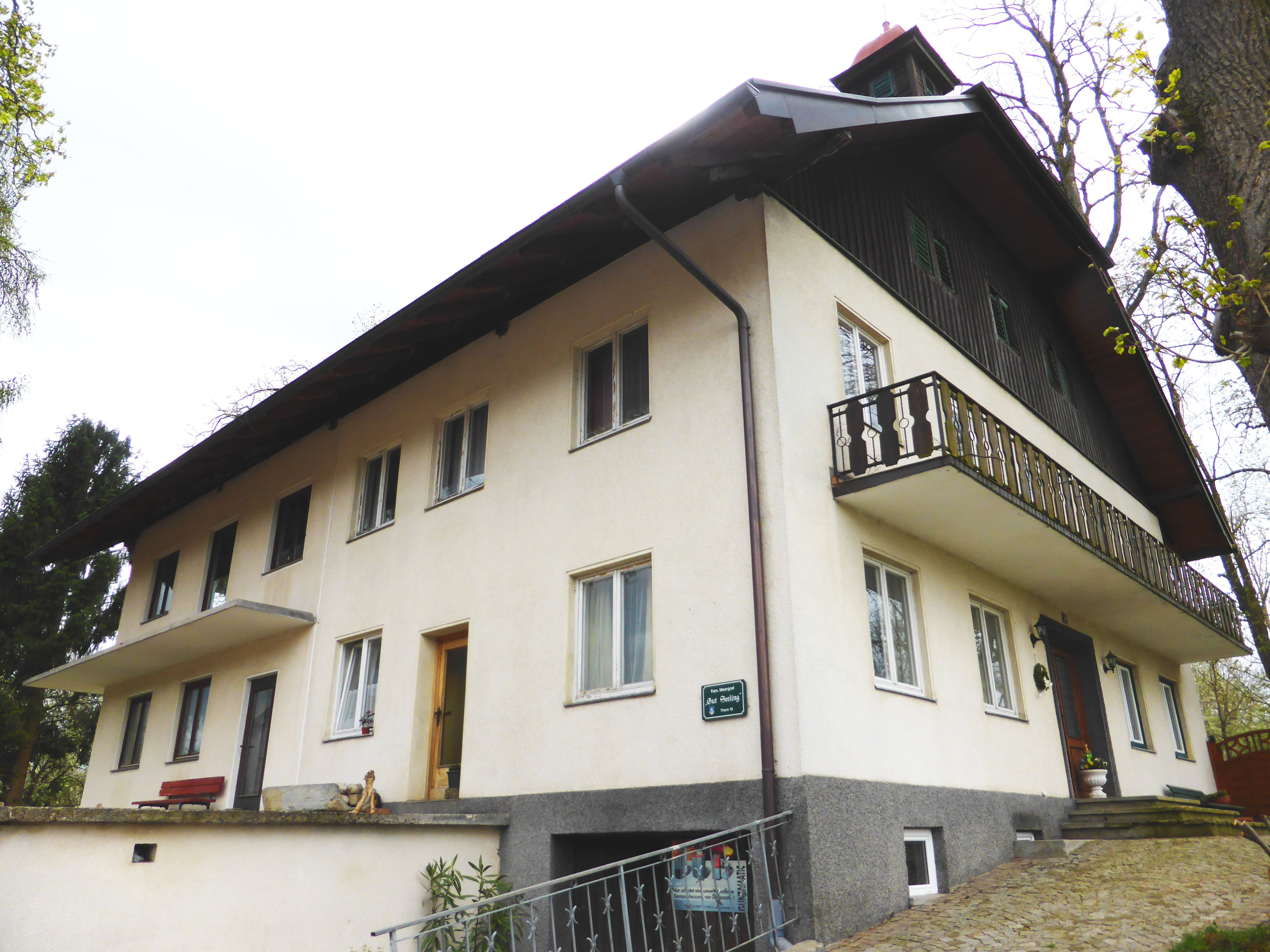 Gut Seeling (St. Georgen am Attersee)